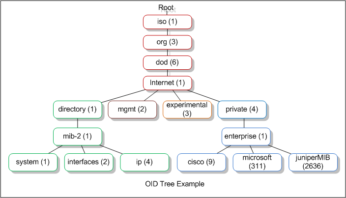 Монгол: MIB tree бүтэц